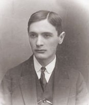 Josef František Munclingr (1888 – 1954), Český operní pěvec a režisér.